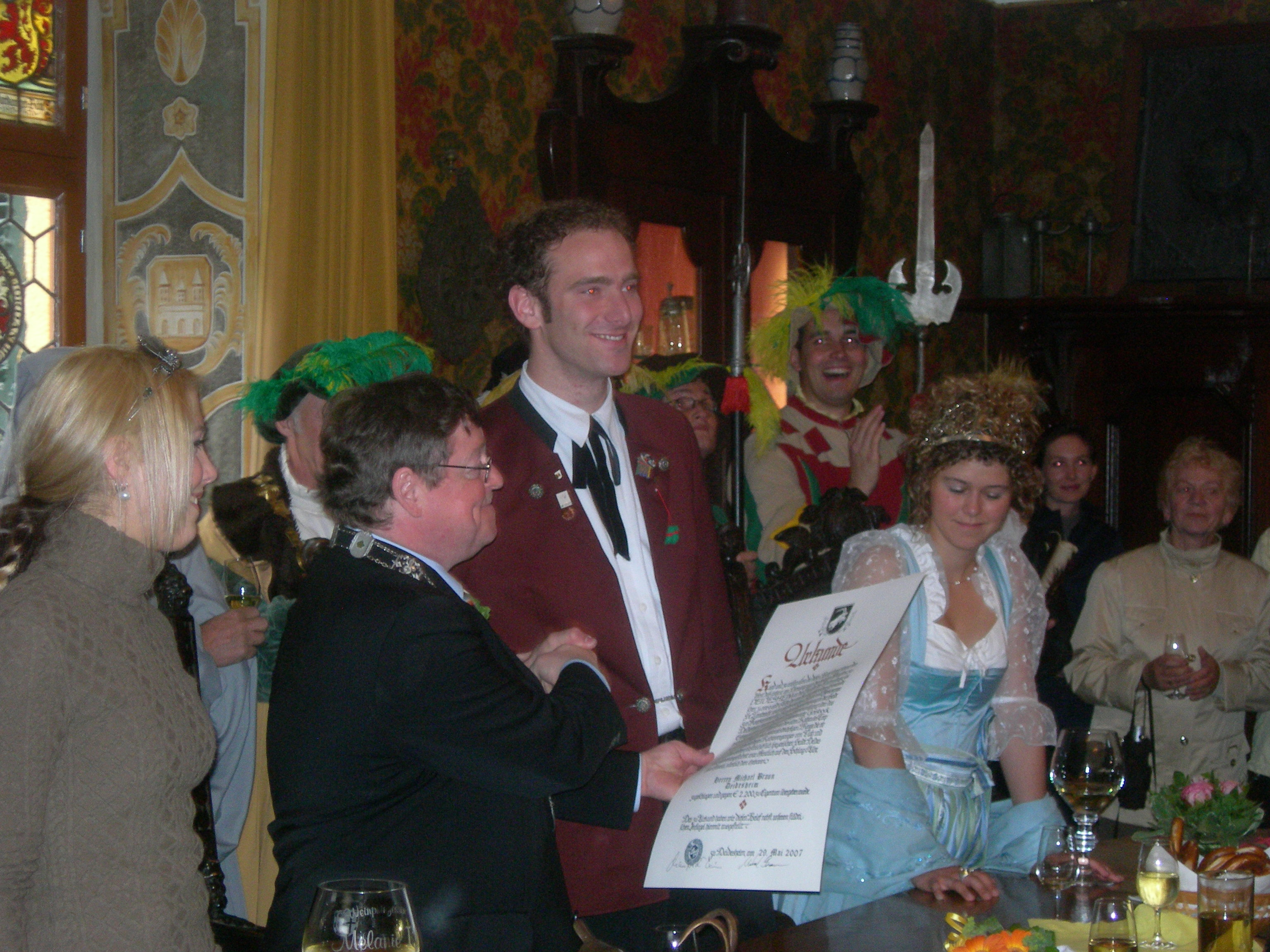 Der Deidesheimer Stadtbürgermeister Manfred Dörr überreicht im Ratssaal des historischen Rathauses in Deidesheim dem Steigerer des 2007er Tributbocks, Michael Braun, der den Geißbock just für 2200 Euro ersteigert hatte, seine urkundliche Bestätigung für dessen Erwerb des Geißbocks. Zur Rechten der beiden ist die Pfälzische Weinkönigin Susanne Winterling, zur Linken die Weinprinzessin der Verbandsgemeinde Deidesheim, Melanie Kaub.